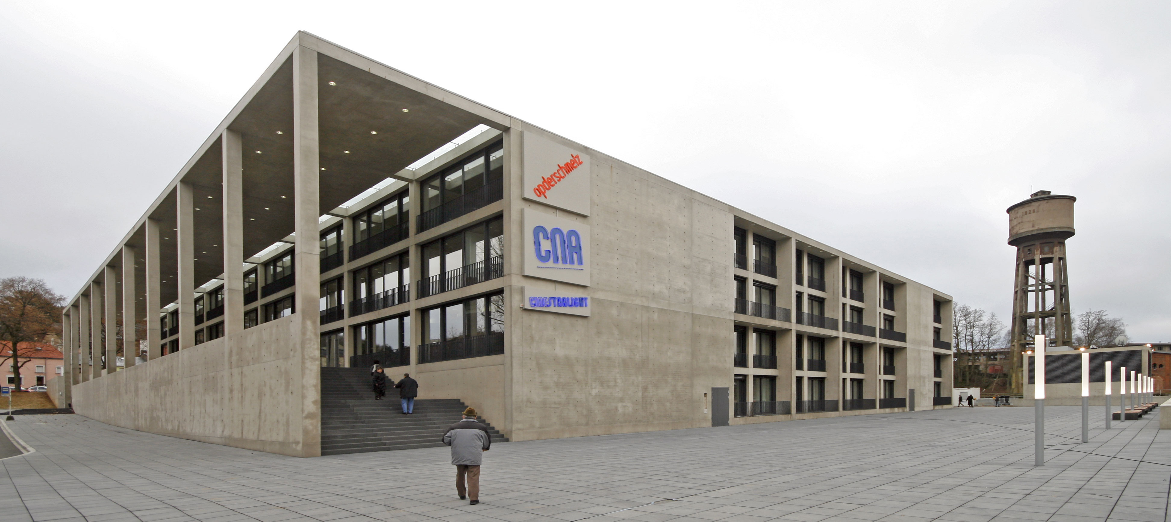 CNA a Centre culturel opderschmelz.